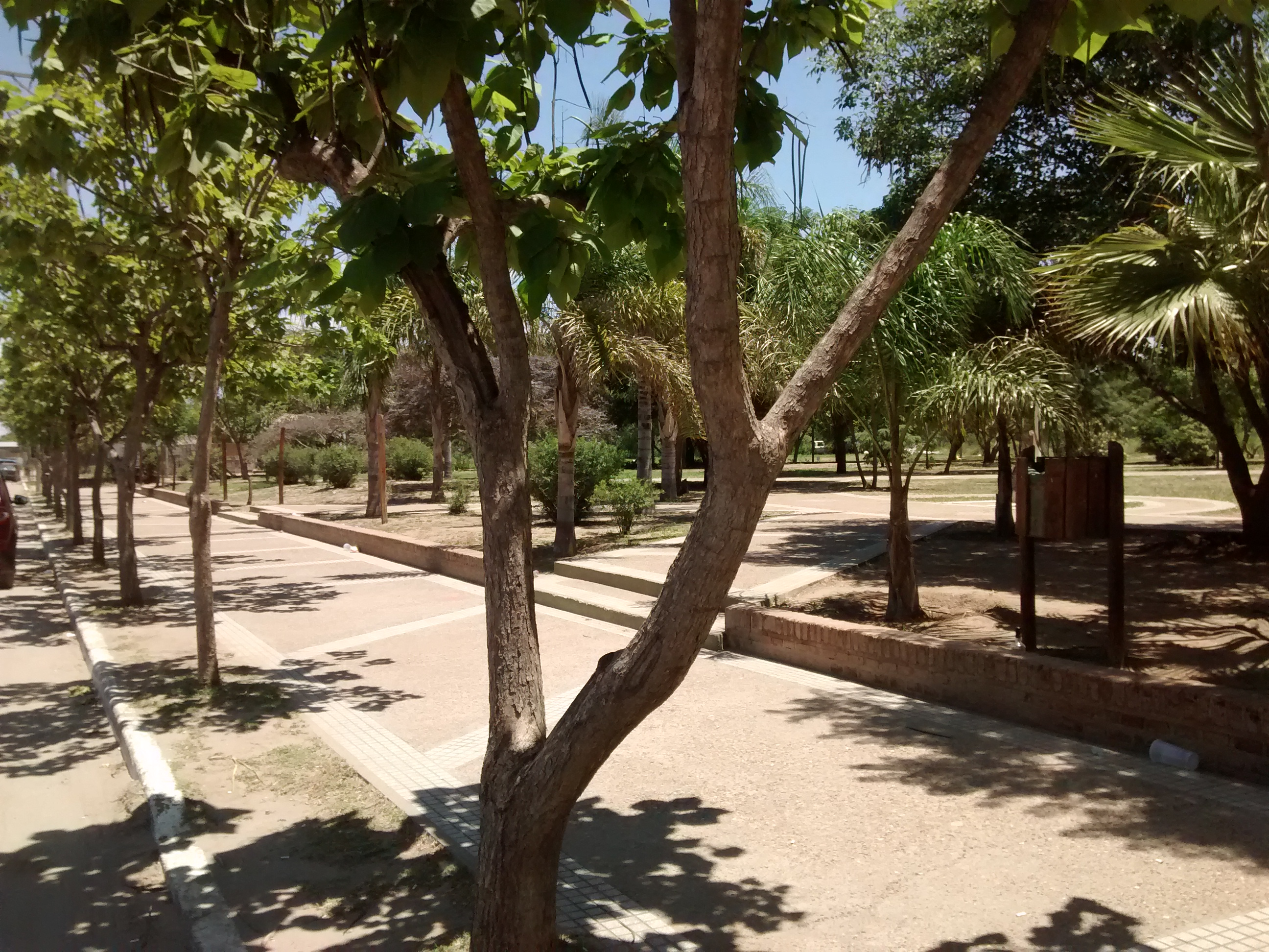 Plaza José de San Martín de la localidad de Malvinas Argentinas, Córdoba, departamento Colón. Está ubicado en la esquina de las calles Tucumán y Avenida San Martín. Foto tomada desde la Avenida San Martín.